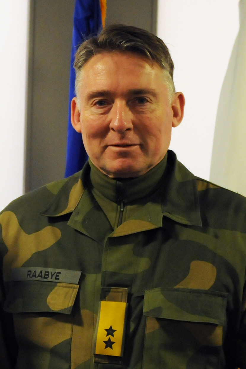 Generalmajor Tor Rune Raabye